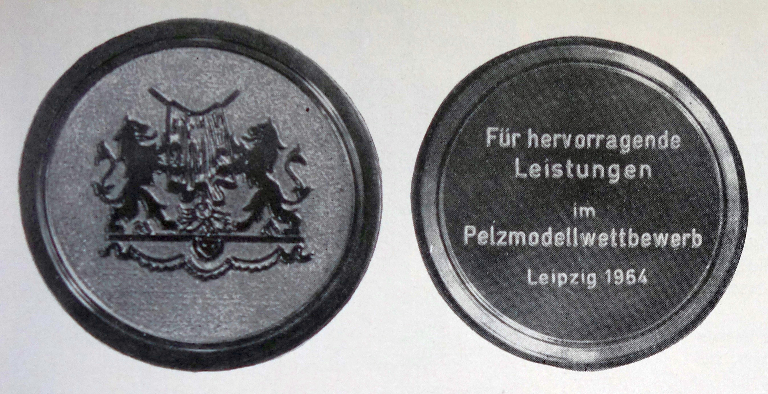 Erster (Zweiter?) Pelzmdellwettbewerb der Kürschner der DDR, Leipzig 1964. Die Siegermedaille